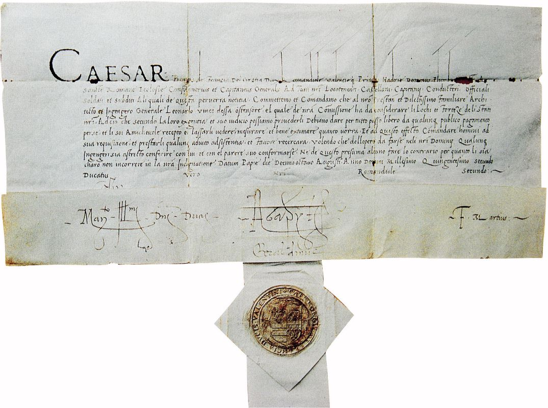 Lasciapassare di Cesare Borgia a Leonardo da Vinci; Vaprio D'Adda, Archivio Melzi d'Eril.